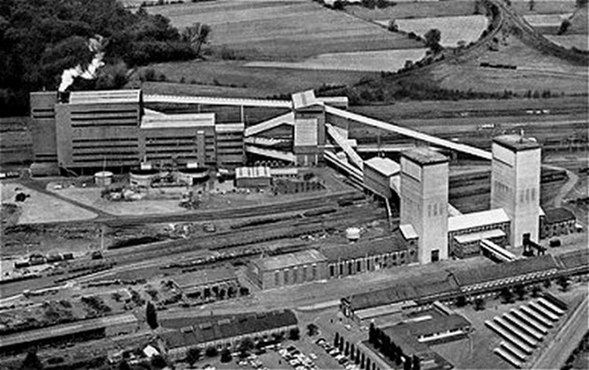 La Fosse Barrois de la Compagnie des mines d'Aniche était un charbonnage constitué de deux puits situé à Pecquencourt, Nord, Nord-Pas-de-Calais, France.